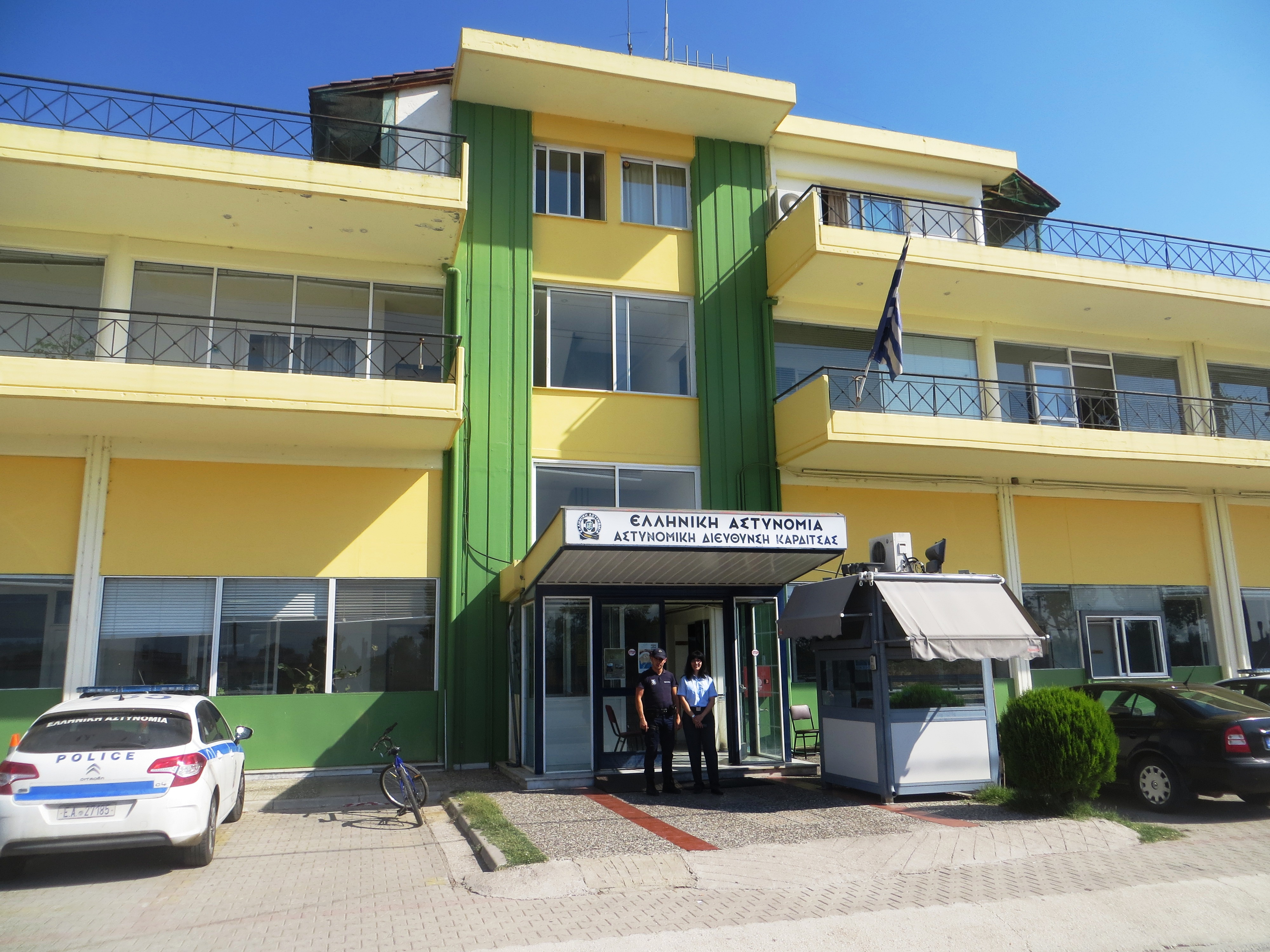 Politiebureau Karditsa